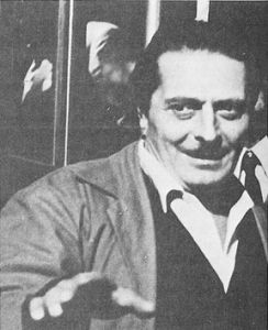 Immagine precedente il 1988 Personaggio scomparso